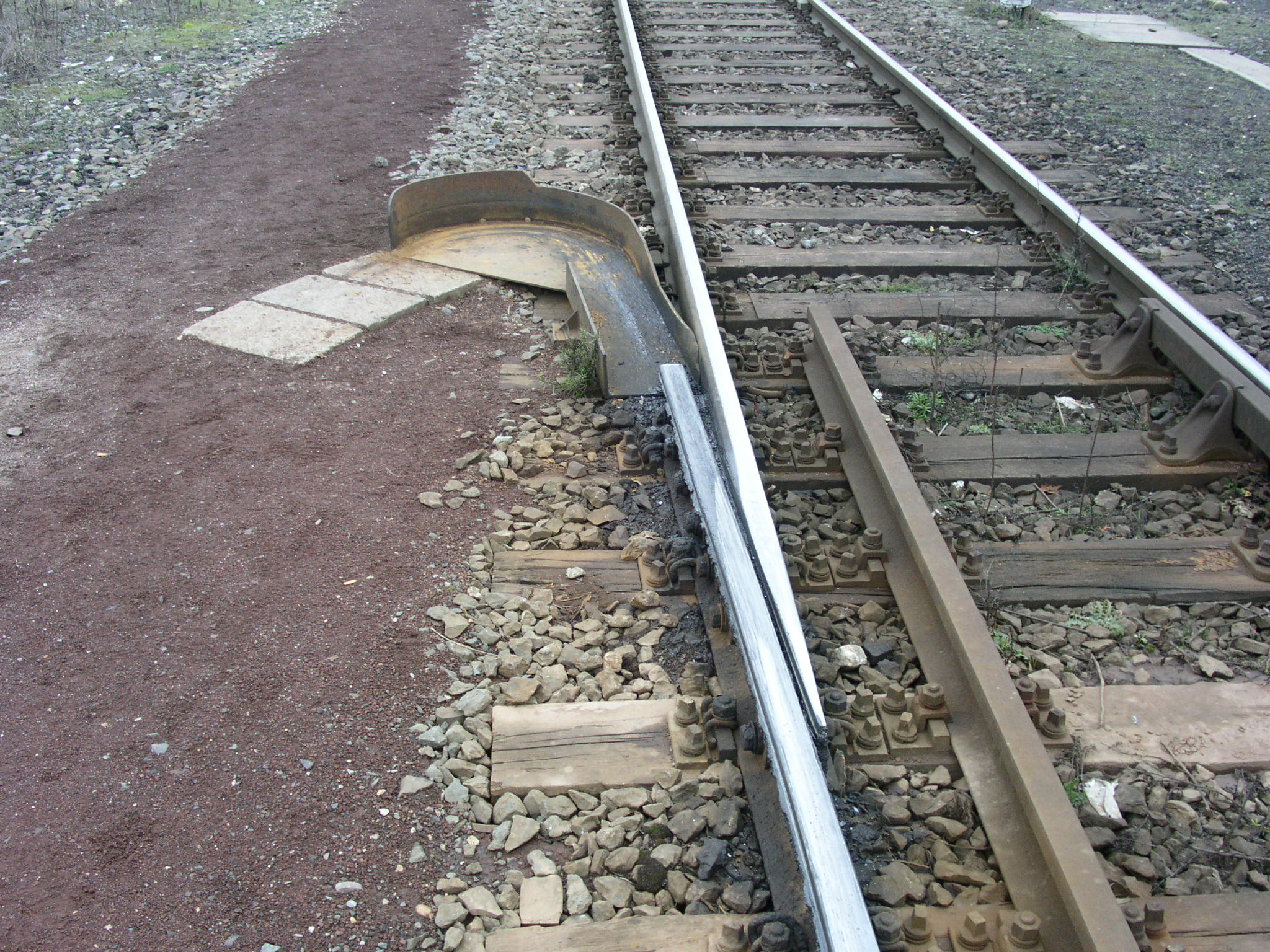 Hemmschuhauswurfbremse